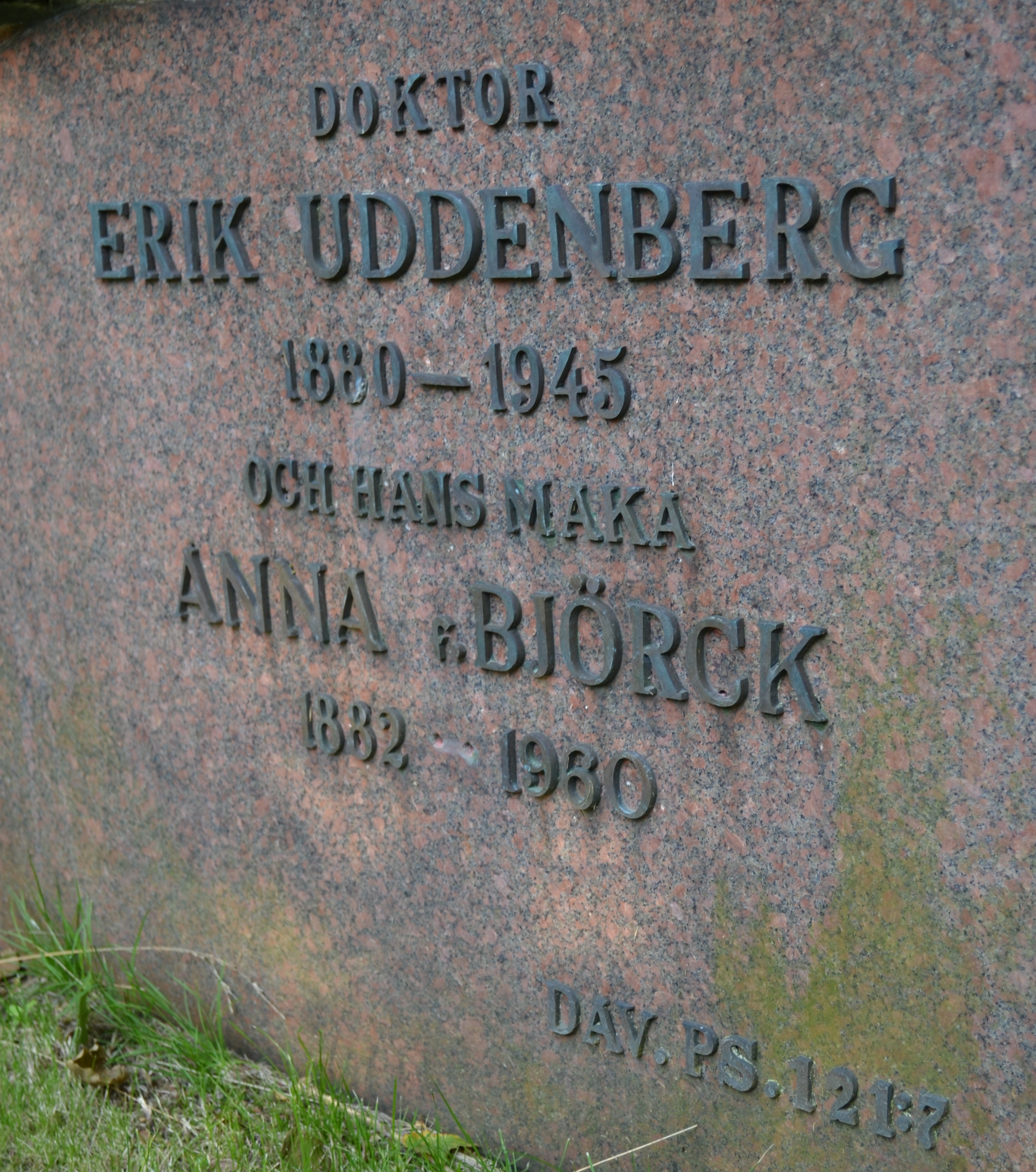 Sankt Jörgens kyrkogård, Varberg.